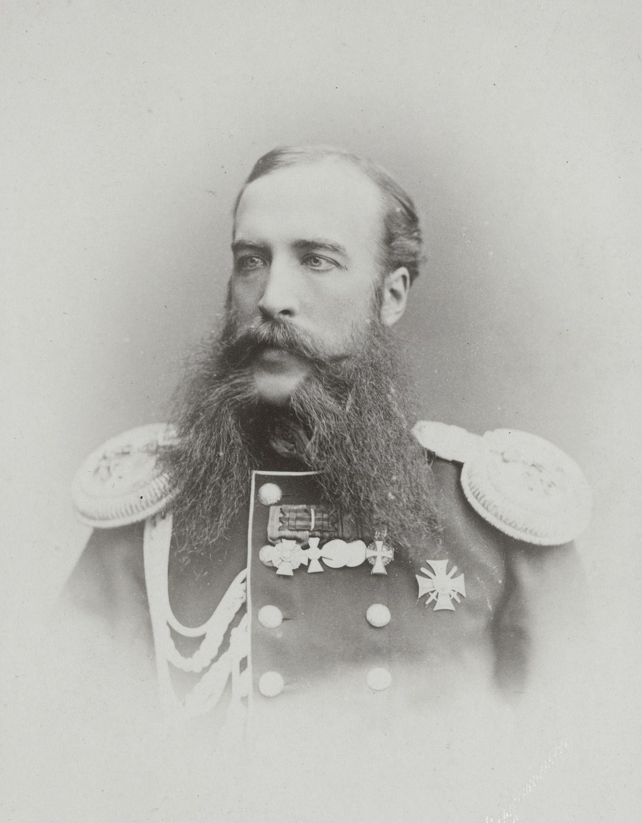 Князь Николай Сергеевич Долгоруков (1840—1913)